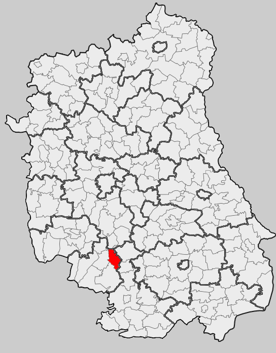 Map of gmina Chrzanów, Janów Lubelski county, Lublin voivodship Mapa gminy Chrzanów, powiat janowski, województwo lubelskie